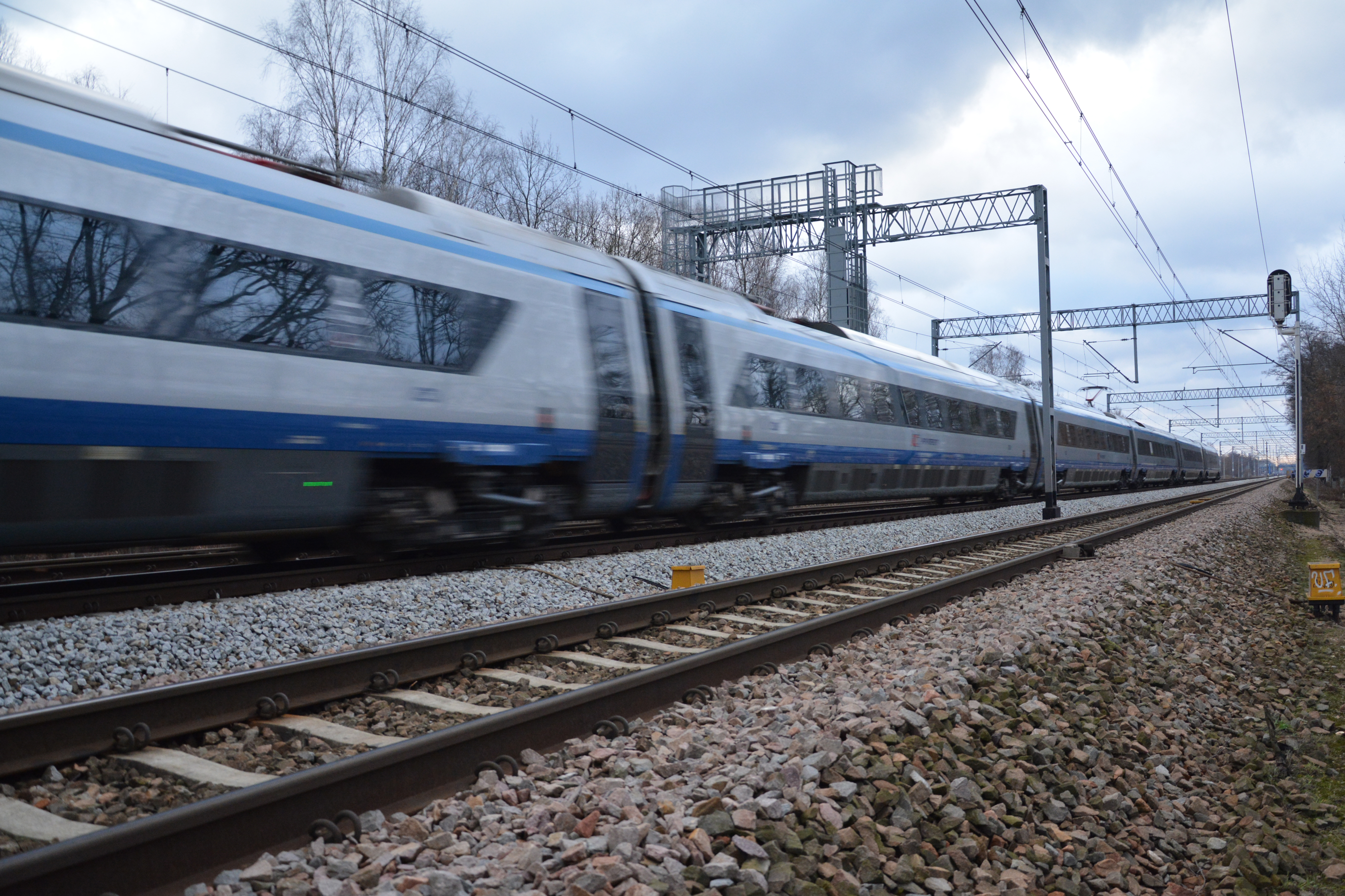 EIP 3504 na E65 w pobliżu stacji Warszawa Płudy